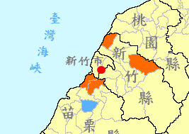 中華大學候選校地 中華大學 1980年代，苗栗縣政府主動在頭屋鄉明德水庫附近規劃六十甲土地，免費提供中華工學院建校，作為苗栗縣第一所大學 1994-1997年，中華工學院積極物色第二校區校地，分別是新豐、關西、竹南、頭份